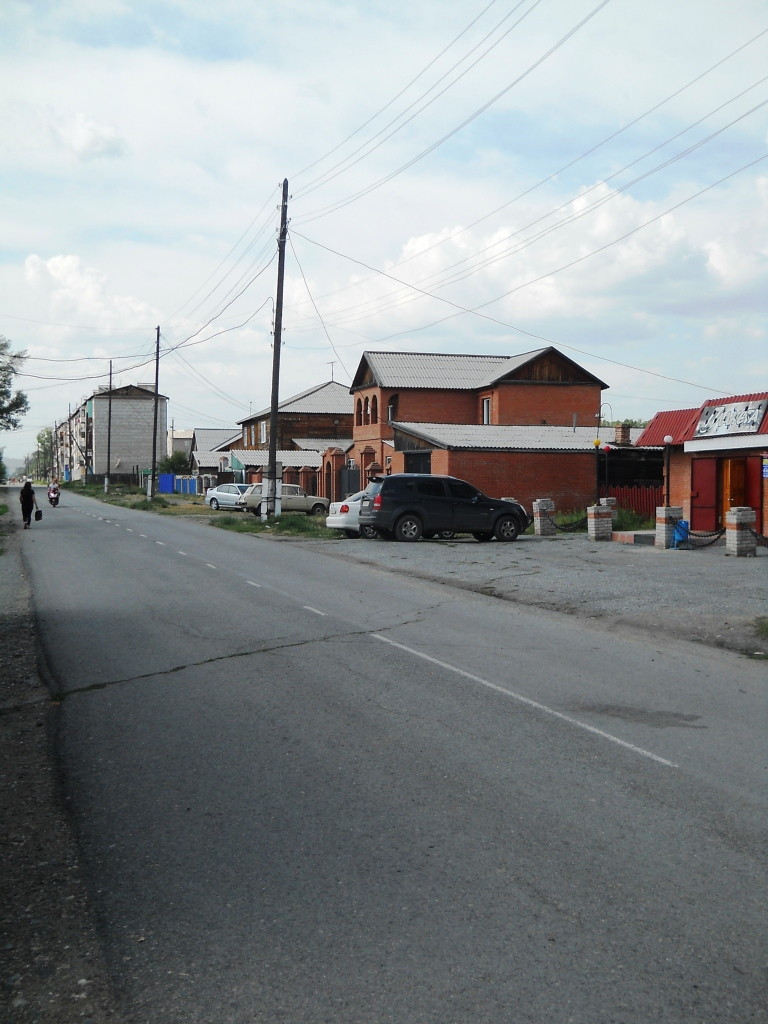 улица поселка Аскиз